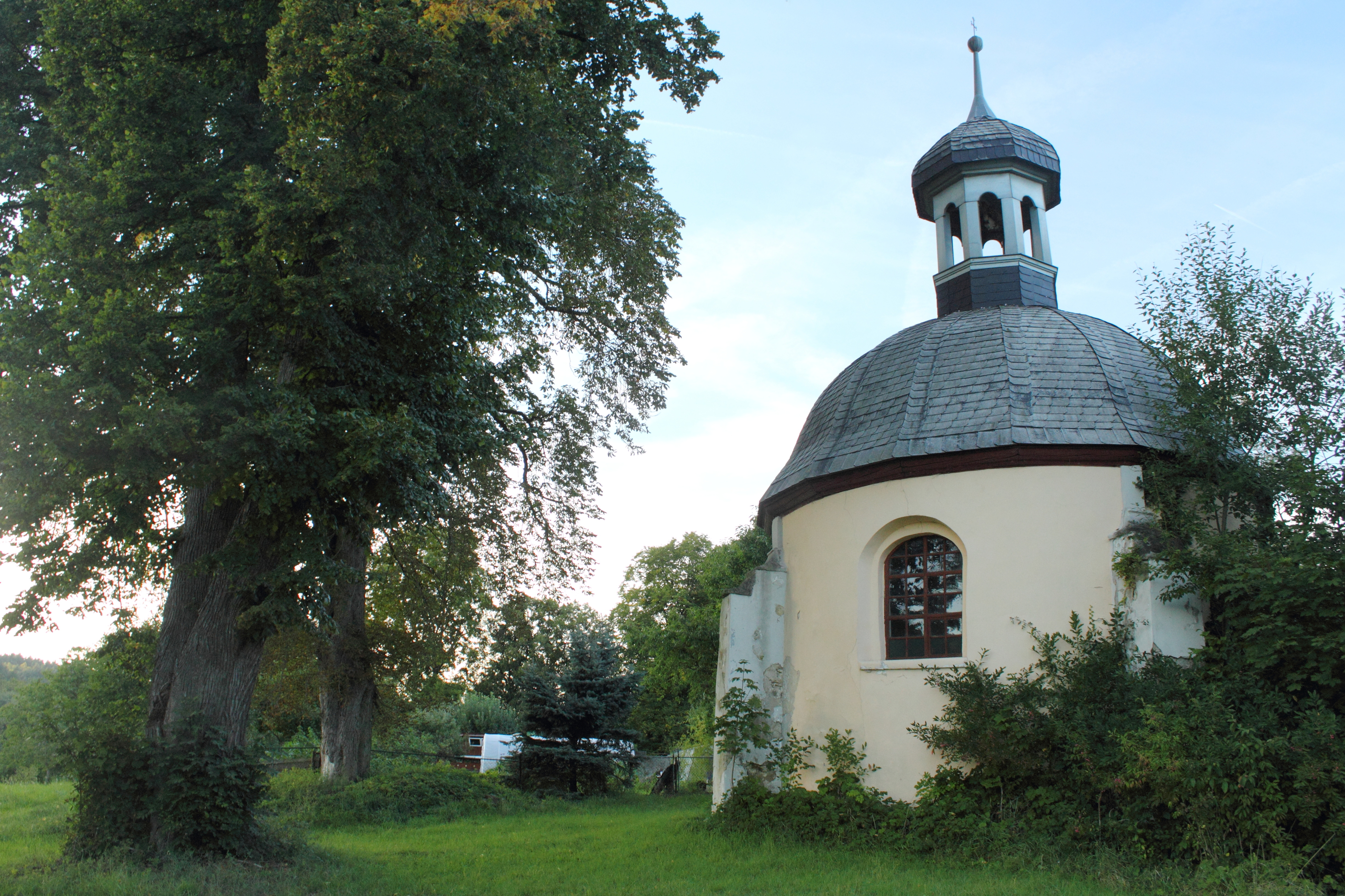 Kaple Navštívení Panny Marie, Hoření Starý Dub